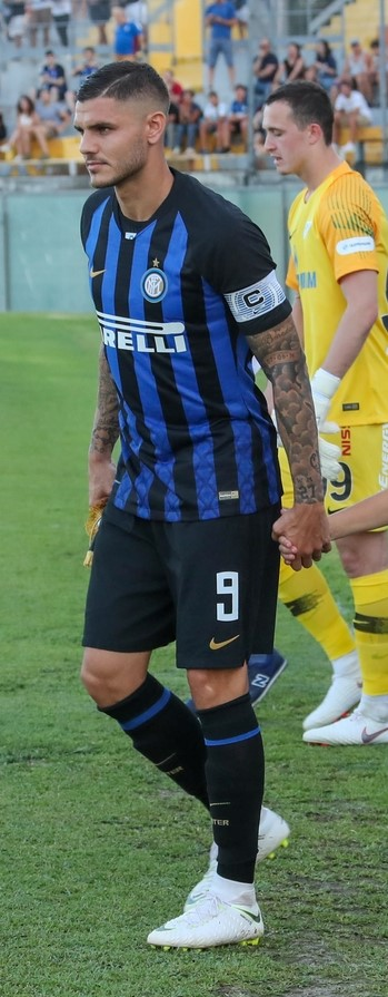 21.07.2018. Италия, Пиза. Третий «Газпром» — тренировочный сбор: товарищеский матч «Интер» — «Зенит».